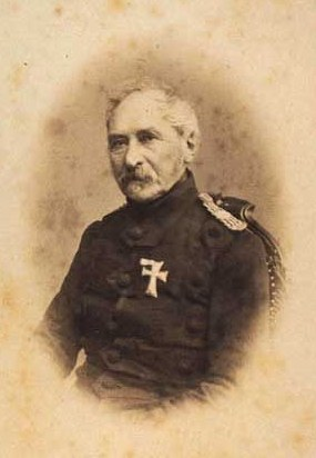 Frederik Gotthold Müller (1795-1882), Danish general